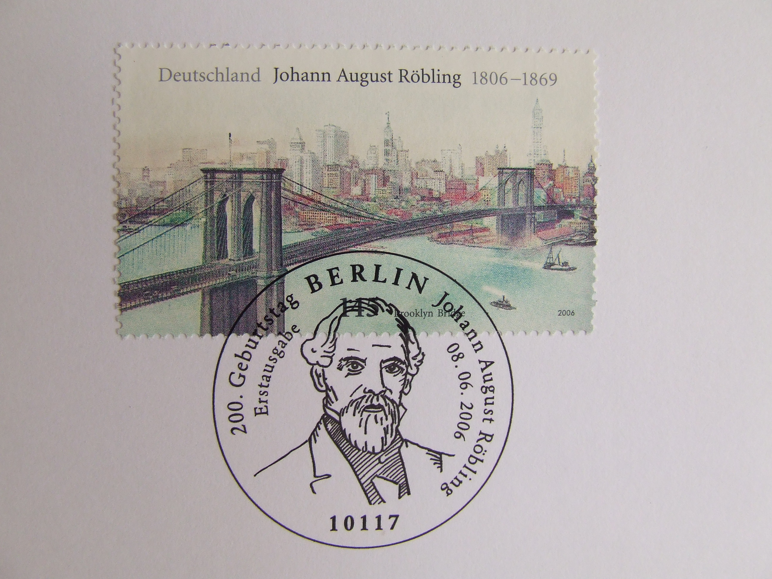 John August Roebling, Stamp, Deutschland 2006.